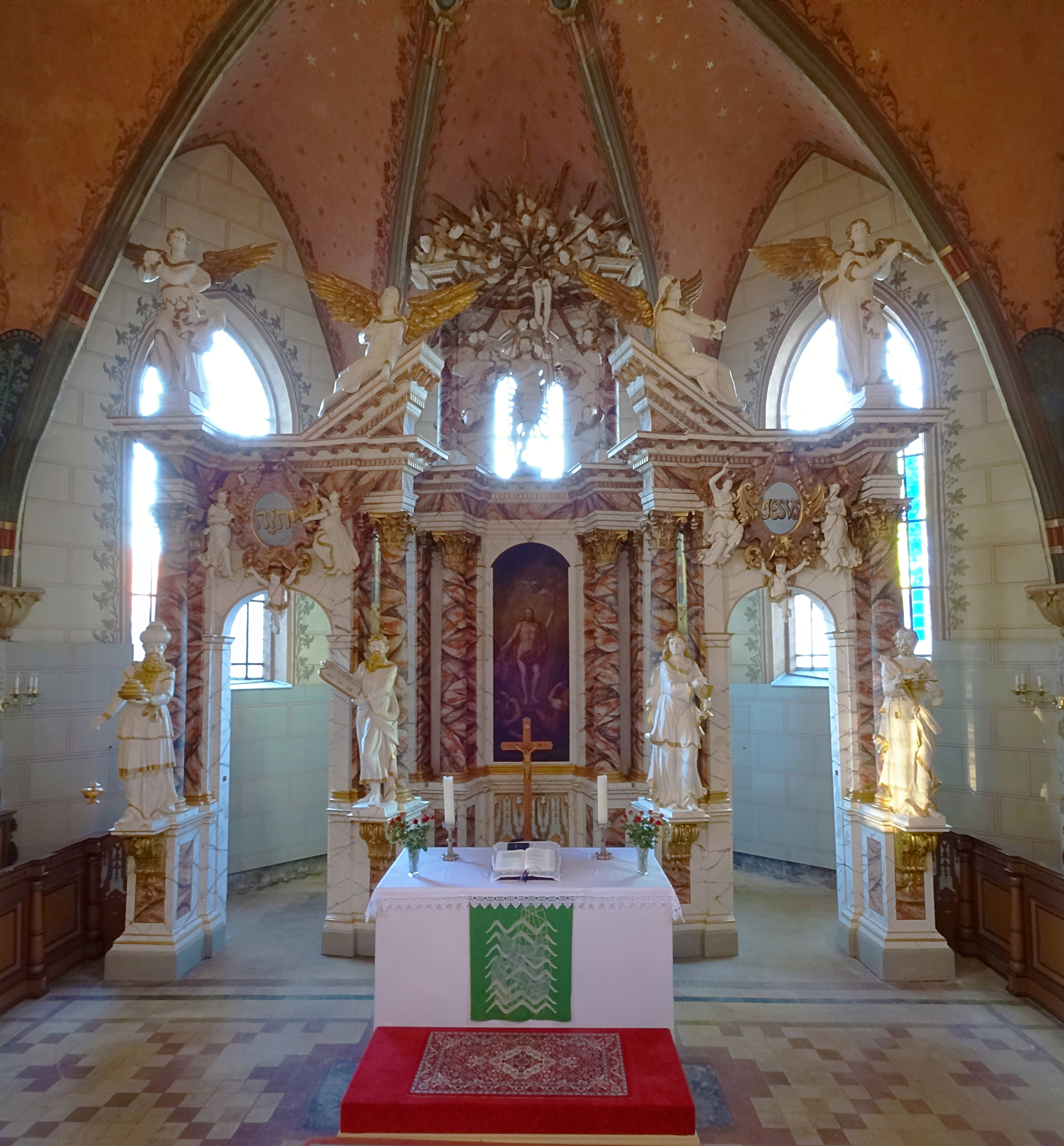 Der spätgotische Chor mit dem Hochaltar. Der Altar wurde vom Kindelbrücker Bildhauer Christian Johann Biedermann gefertigt. Das Altarbild (die Auferstehung Christi) des Hochaltars stammt vom Erfurter Maler Jakob Samuel Beck.